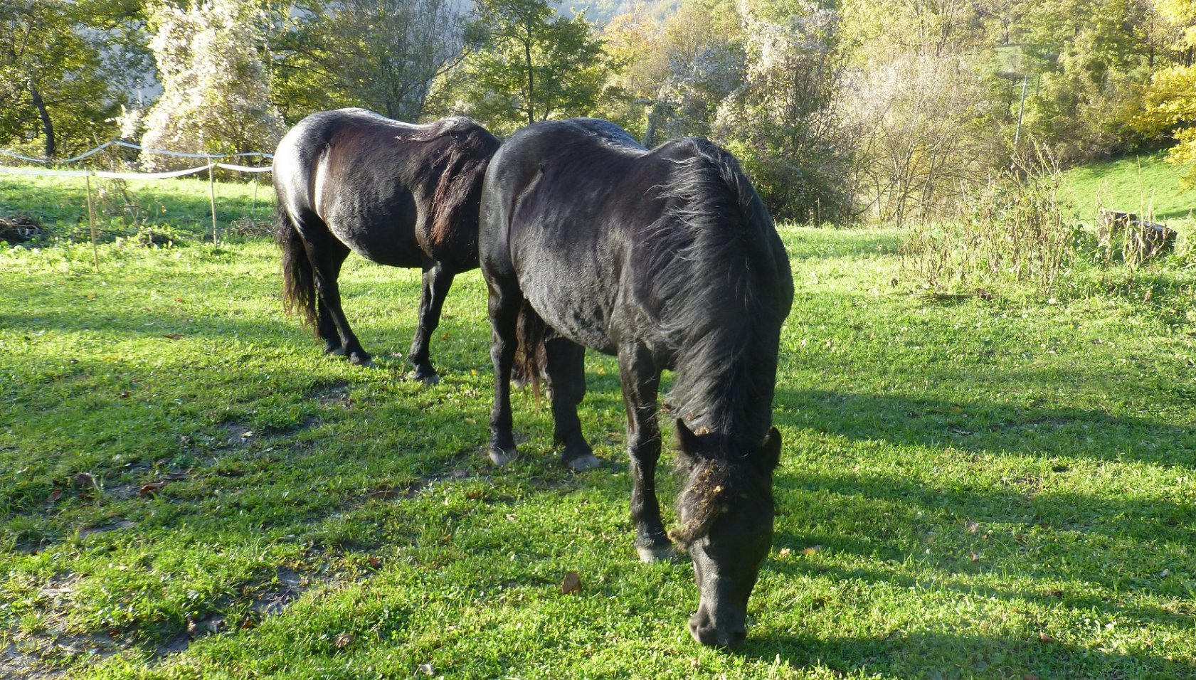 Cavalli bardigiani